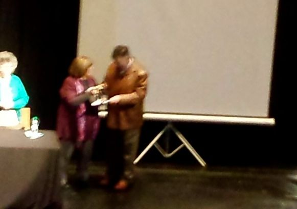 matemático brasileño, visitante ilustre de Montevideo